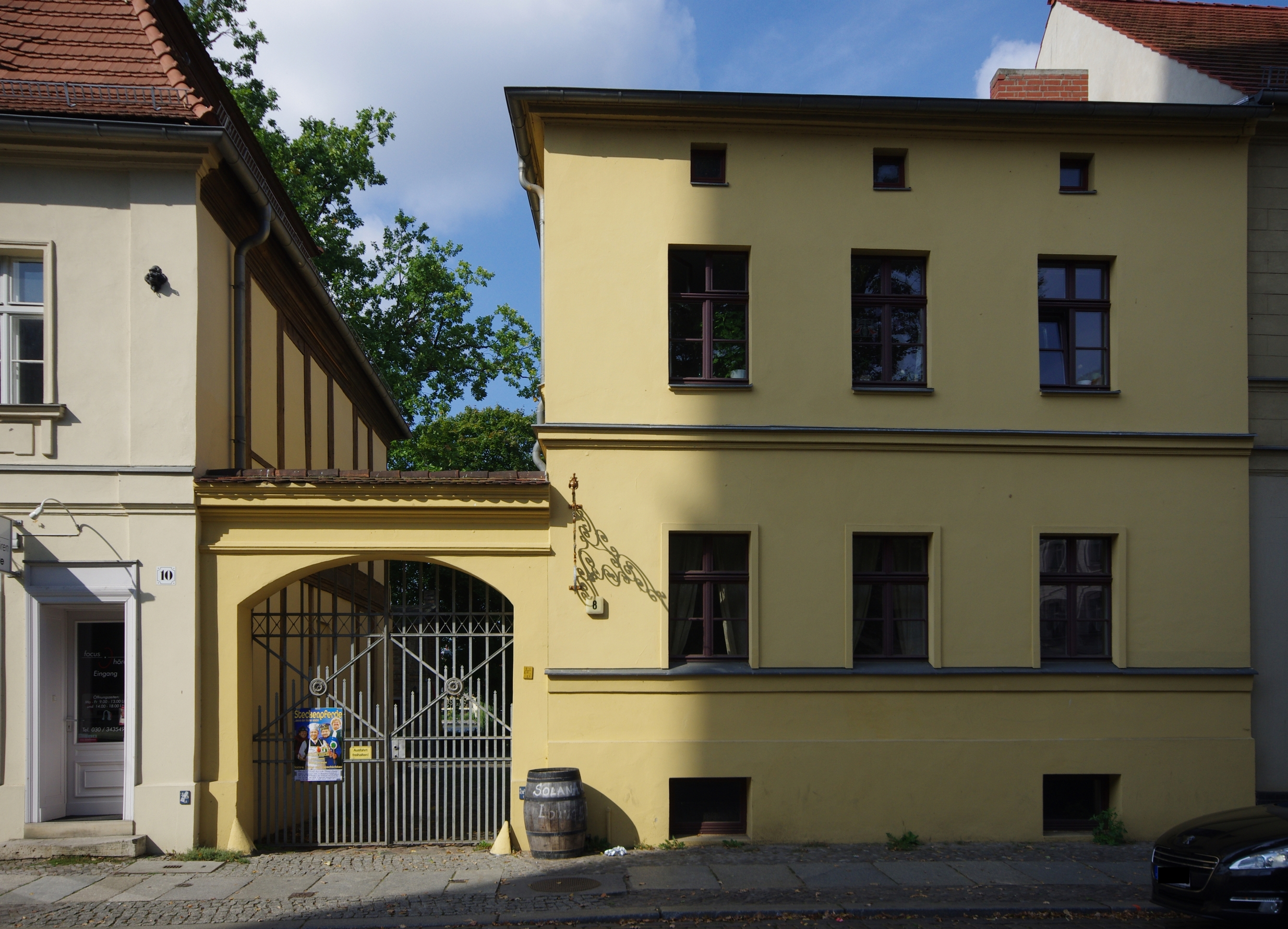 Berlin Bezirk Treptow-Köpenick Ortsteil Köpenick. Das Haus Alt-Köpenick 8 steht unter Denkmalschutz.